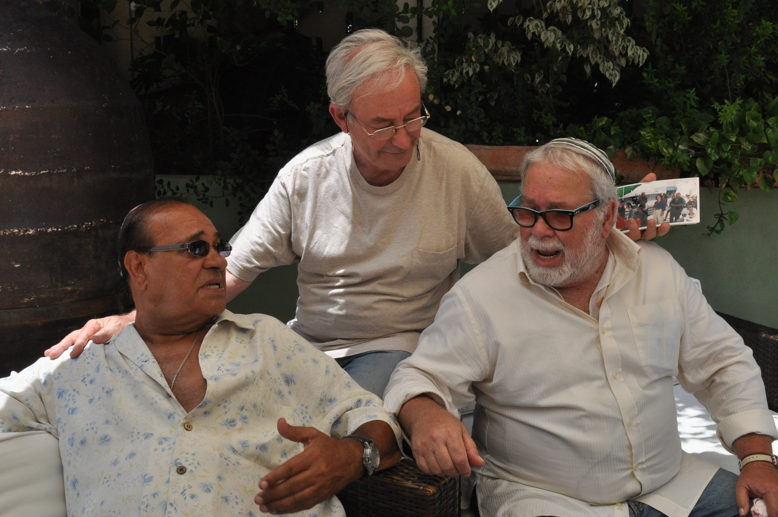 מתוך הסרט התיעודי "מבעד לעיניים – יוני המנחם"